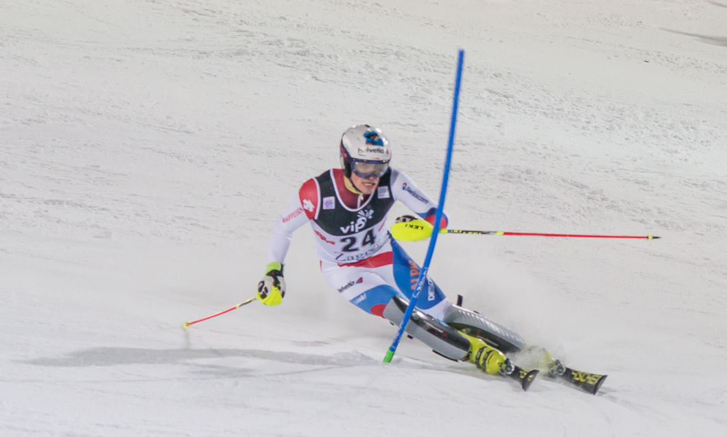 Daniel Yule (1993), alpine skier from Switzerland